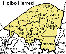 Holbo Herred Frederiksborg Amt , Denmark. Map by Svend-Erik Christiansen, edited by user:Nico-dk .